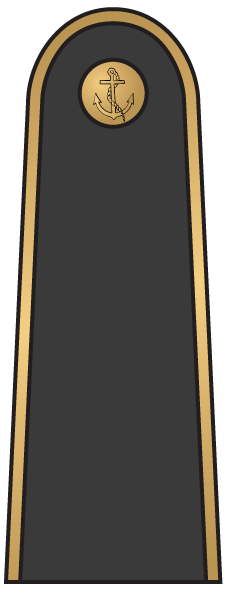 Jūreivis. Lietuvos Karinių jūrų pajėgų jūreivio (atitinkančio eilinį) antpetis.